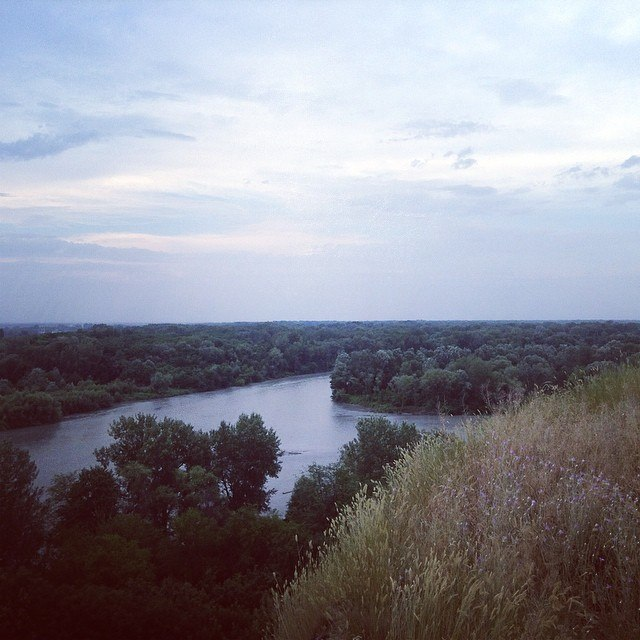 Река Терек у села Терекское Адыгэбзэ: Тэрч Болътей деж